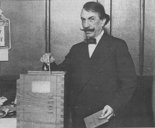 Alfredo Palacios votando hacia 1931.